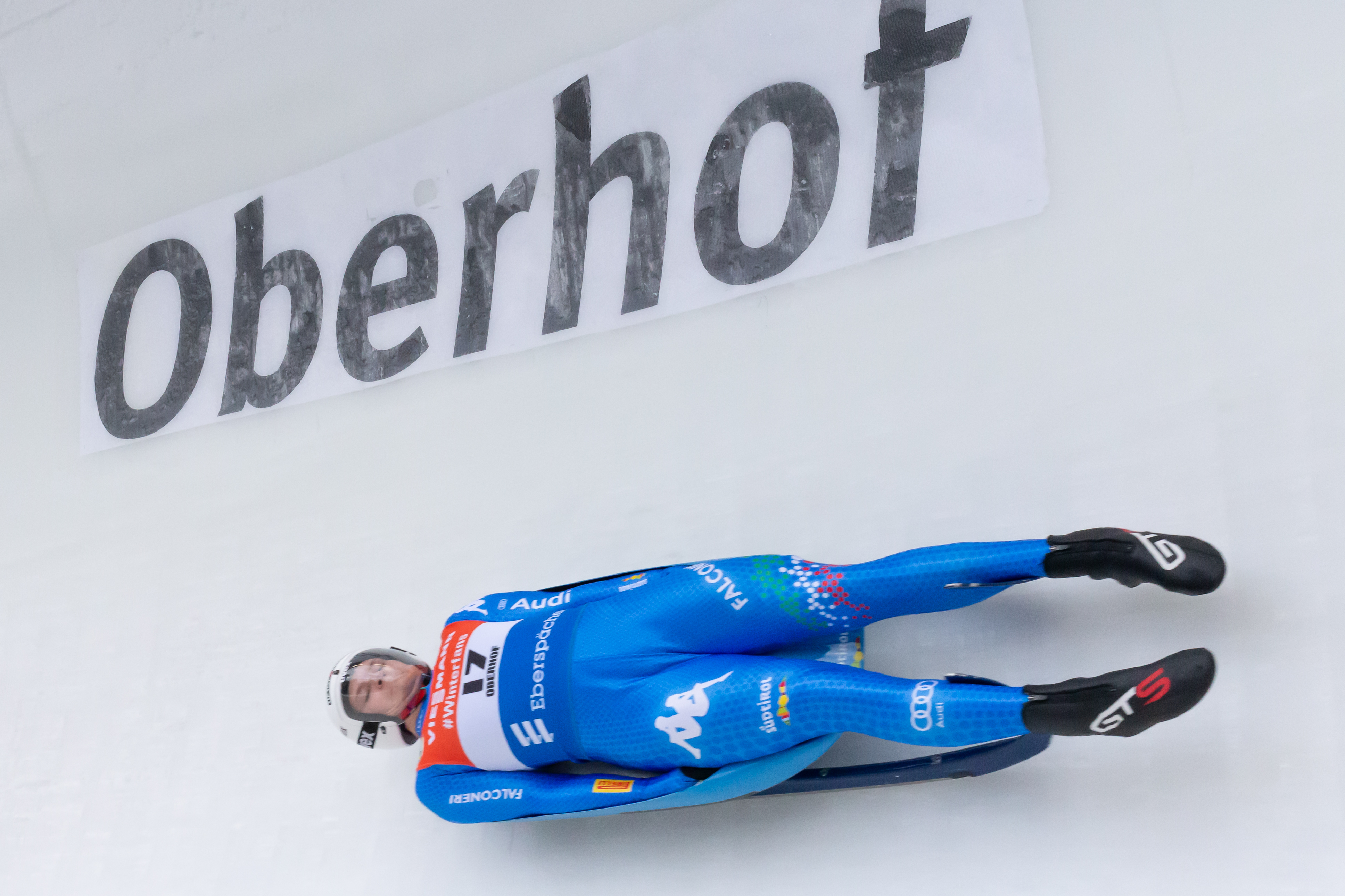 Viessmann Luge World Cup Oberhof; Kevin Fischnaller (ITA, Italien) während der Fahrt